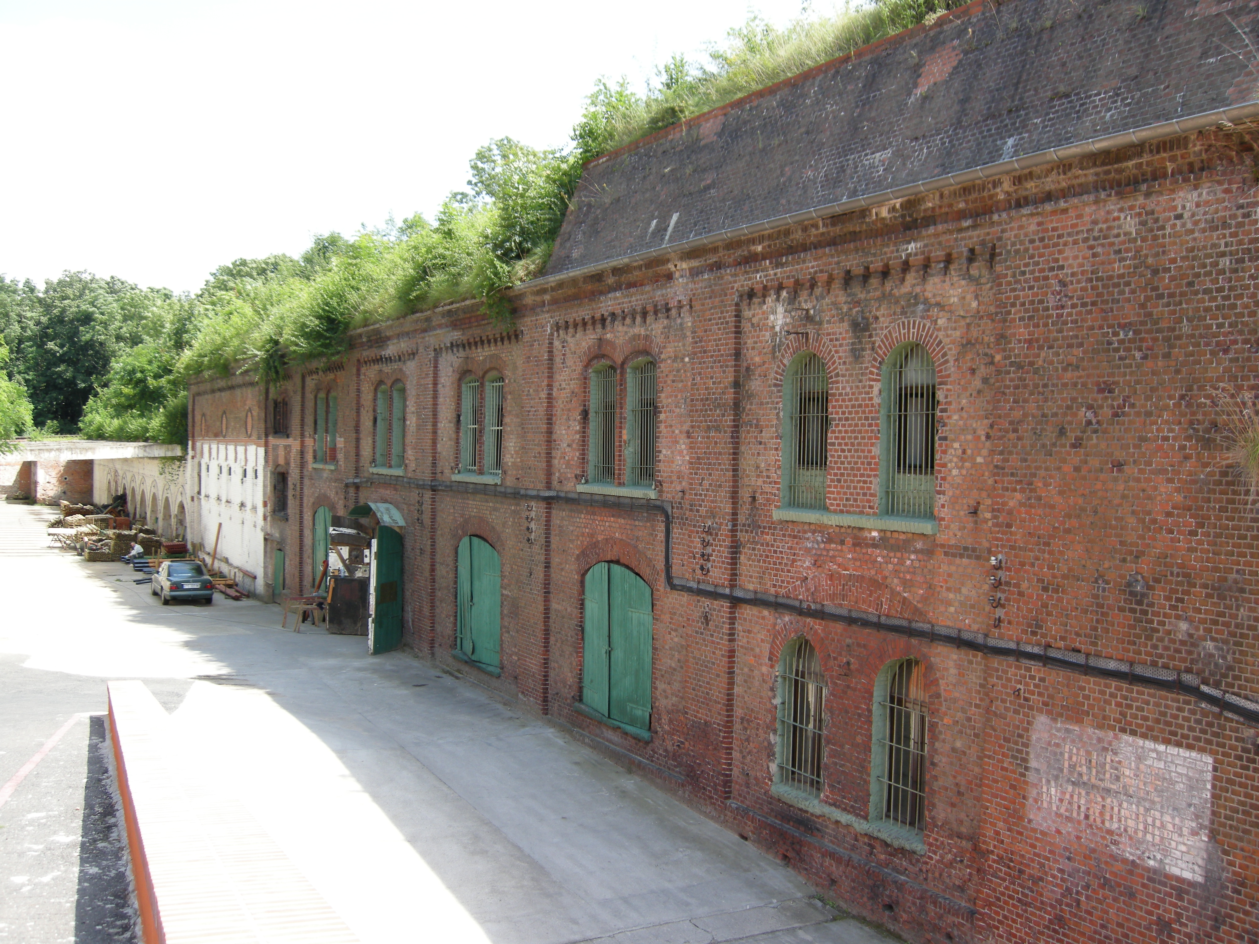 Fort I twierdzy Poznań